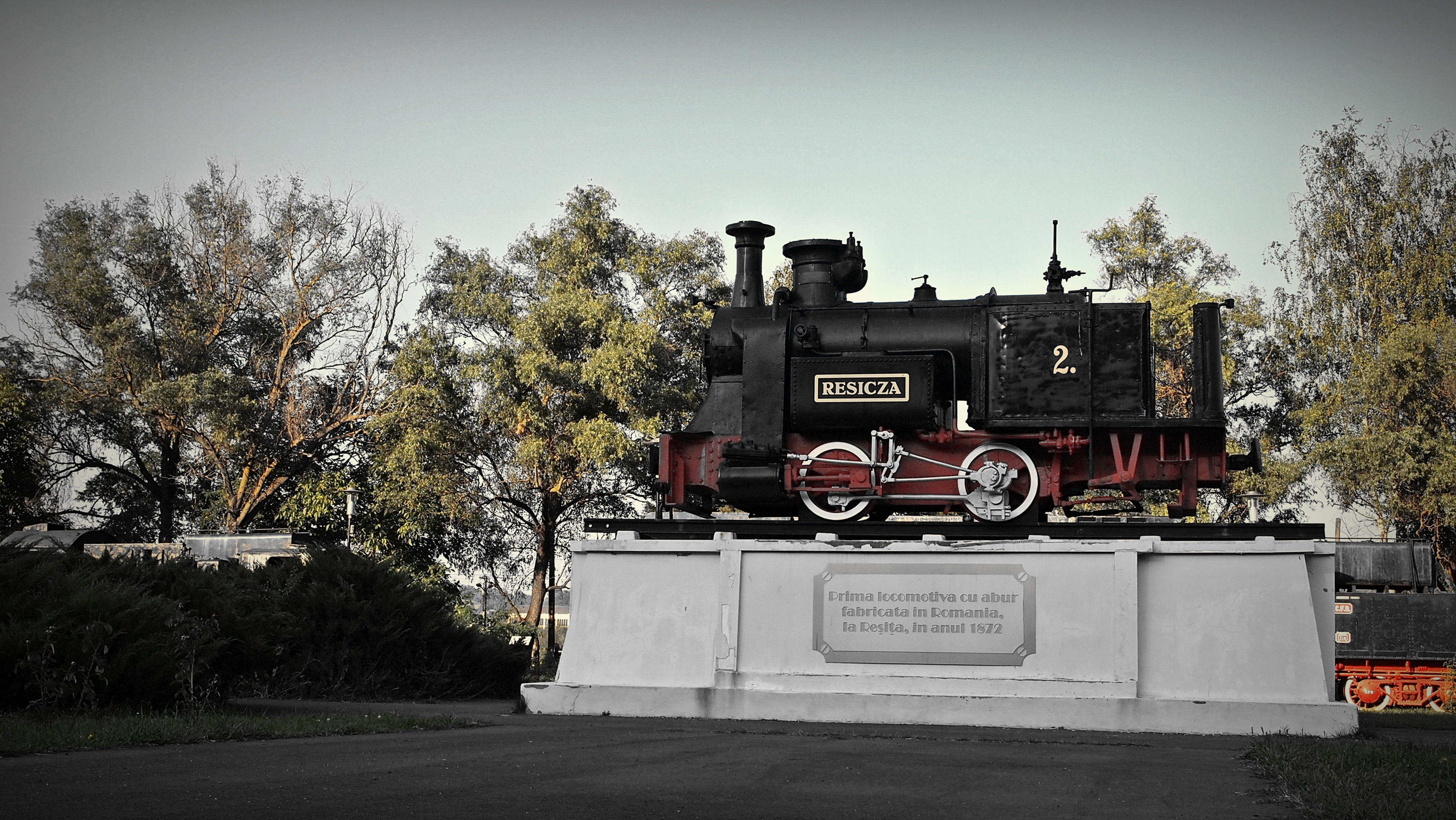 Muzeul de locomotive cu abur din Resita, este cel mai mare muzeu de locomotive cu abur, în aer liber, din Europa. În urmă cu 140 de ani a fost fabricată la Reşiţa prima locomotivă cu abur românească, iar acum 40 de ani a avut loc inaugurarea unei expoziţii de locomotive cu abur în aer liber, conţinând 16 piese reprezentative ale perioadei de fabricaţie 1872-1960.